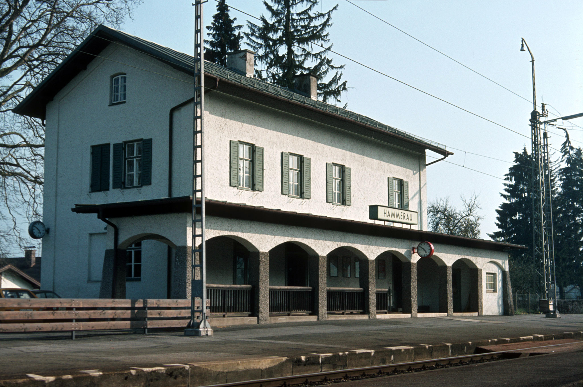 Der Bahnhof Hammerau (Bahnlinie Freilassing- Bad Reichenhall - Berchtesgaden) im April 1981